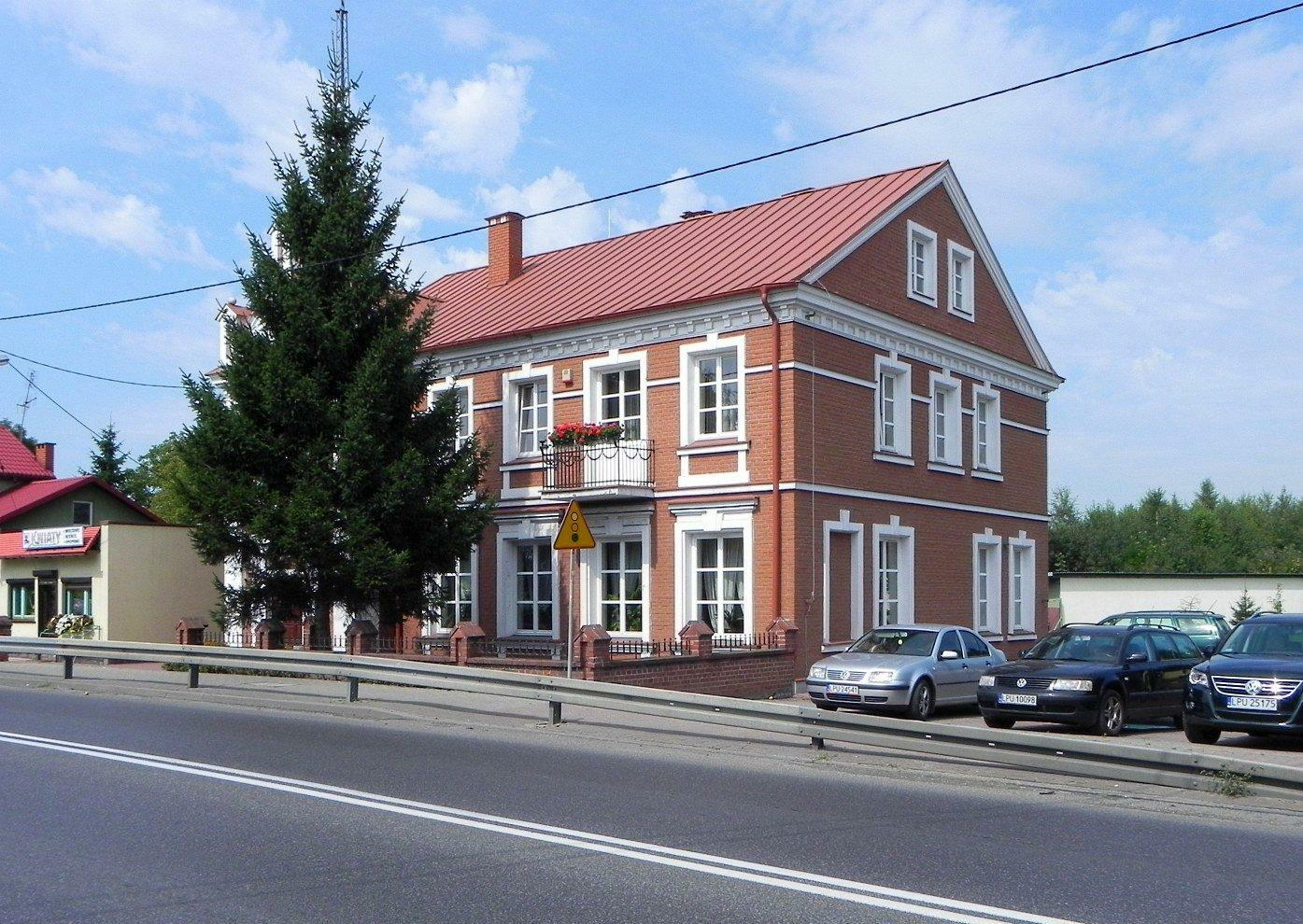 Urząd Gminy w Kurowie przy ulicy Lubelskiej 35.